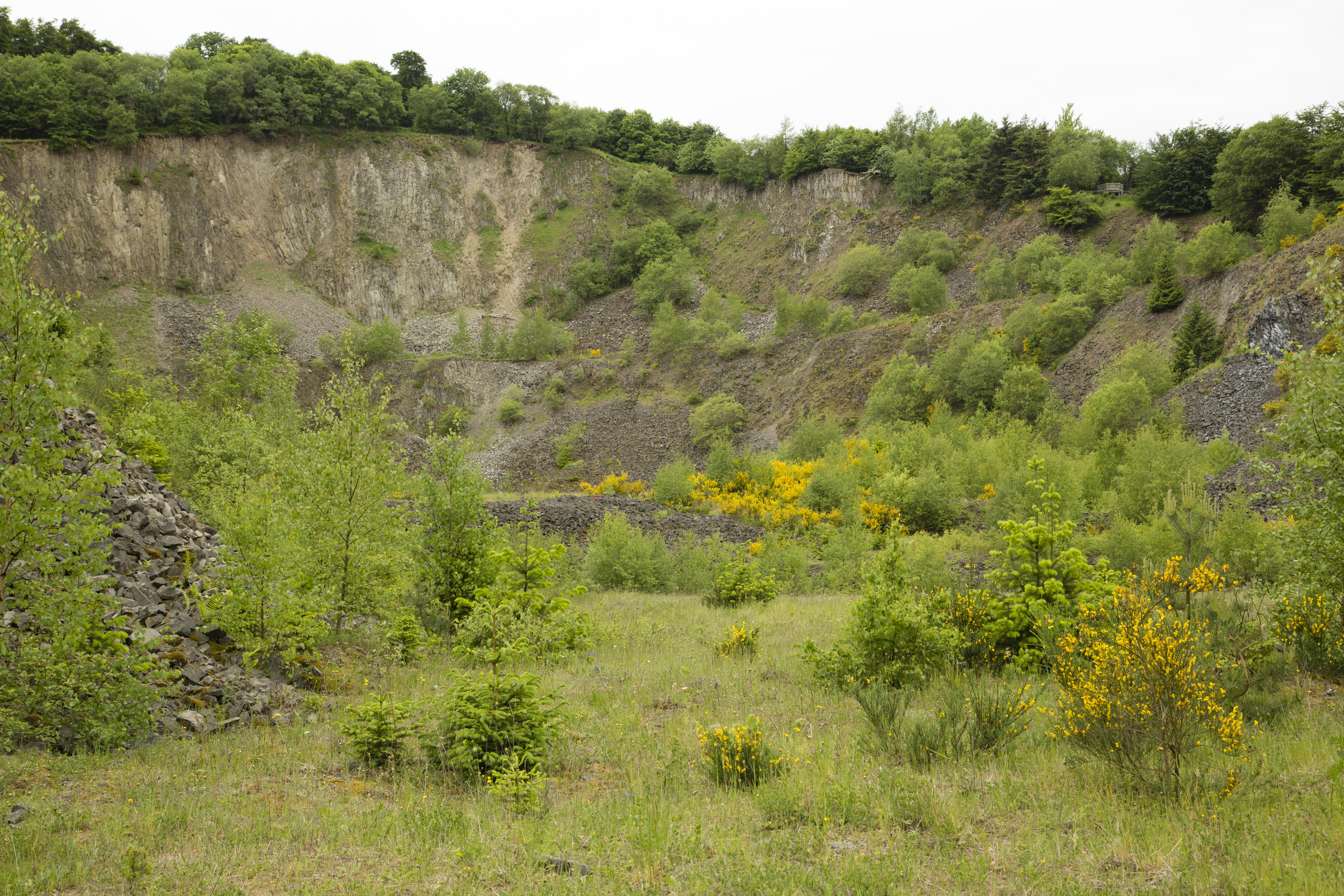 Frühlingsbild im Naturschutzgebiet „Hochbermel“, Rheinland-Pfalz